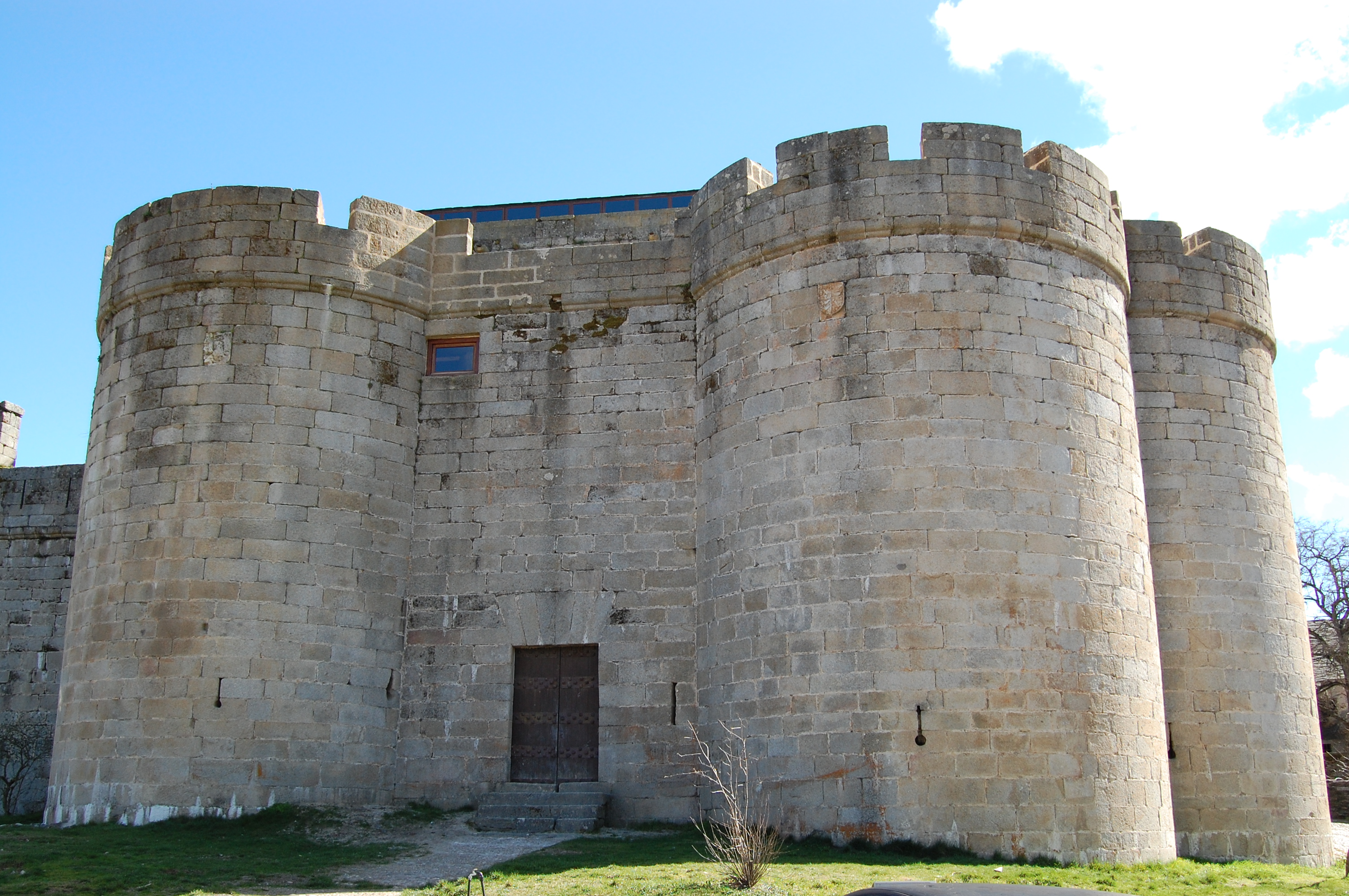 Lo mandó construir, a modo de castillo-palacio, Don Rodrigo Alonso Pimentel, cuarto conde de Benavente, miembro de la poderosa nobleza castellana y poseedor de numerosos castillos, en el siglo XV sobre una antigua torre del siglo XIII perteneciente a la familia Losada. La construcción se alargó hasta principios del siglo XVI y prestó buenos servicios a los Reyes Católicos en su lucha con Portugal. En el siglo XVII se amplió con nuevas técnicas de artillería.